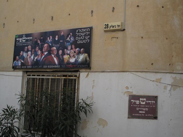 משרדי תיאטרון האידיש שפיל ברחוב ביאליק